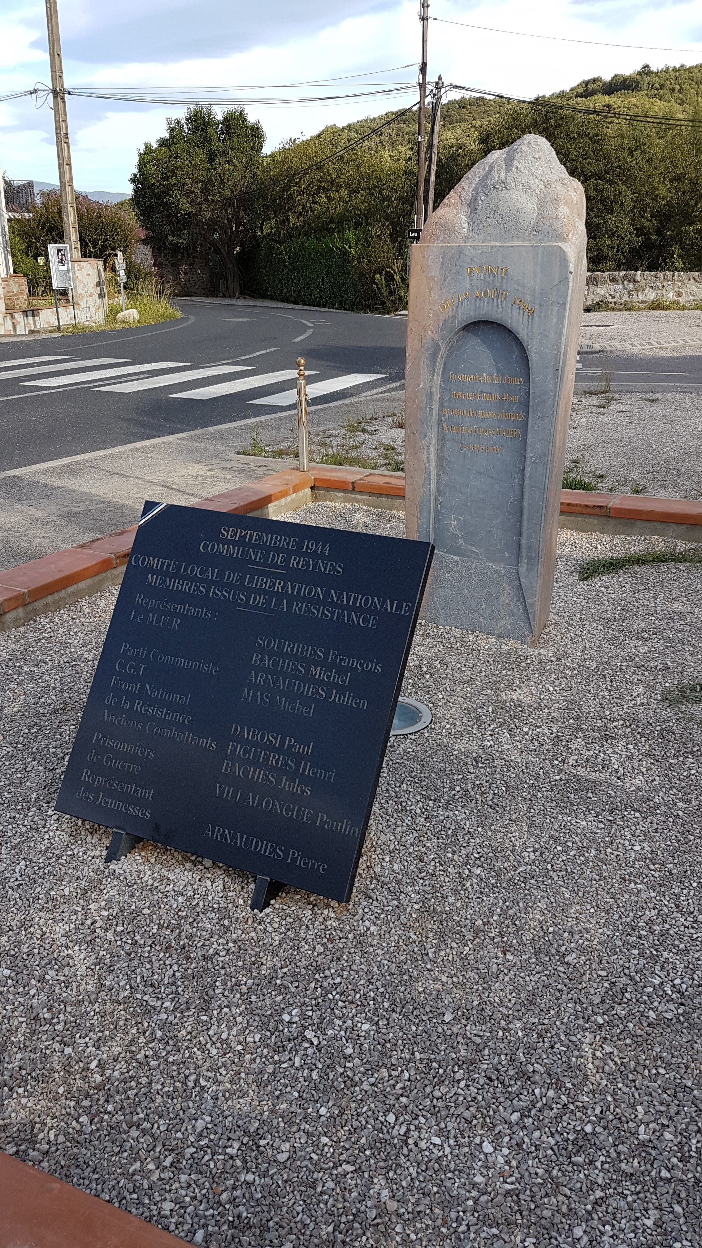 Stèle du Pont du 19 août 1944 à Reynès. Texte de la stèle : « Pont du 19 août 1944 : En souvenir d'un fait d'armes mené par le maquis 44 sur un convoi de camions allemands, le capitaine François Madern y a trouvé la mort. »